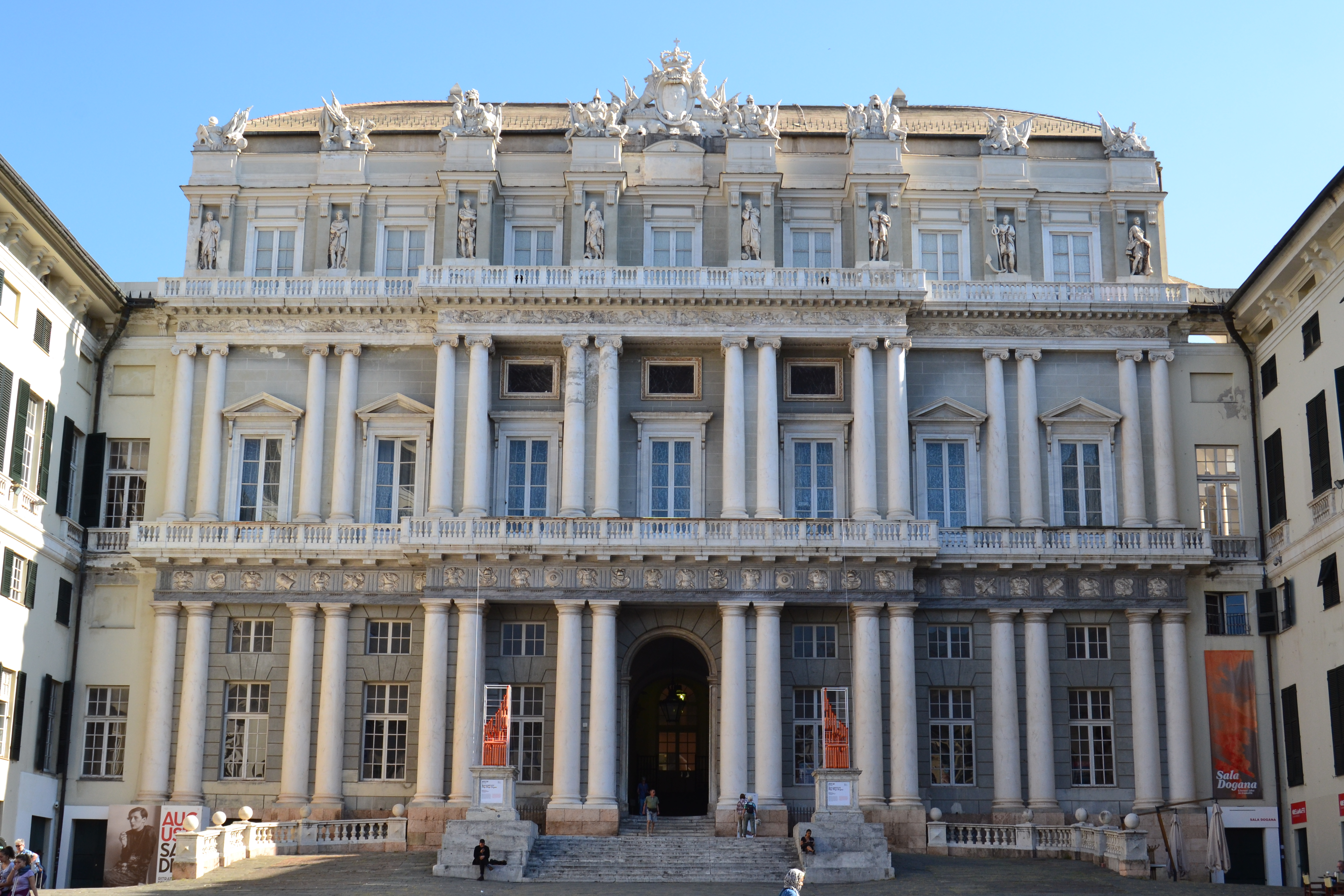 Palazzo Ducale di Genova This is a photo of a monument which is part of cultural heritage of Italy.